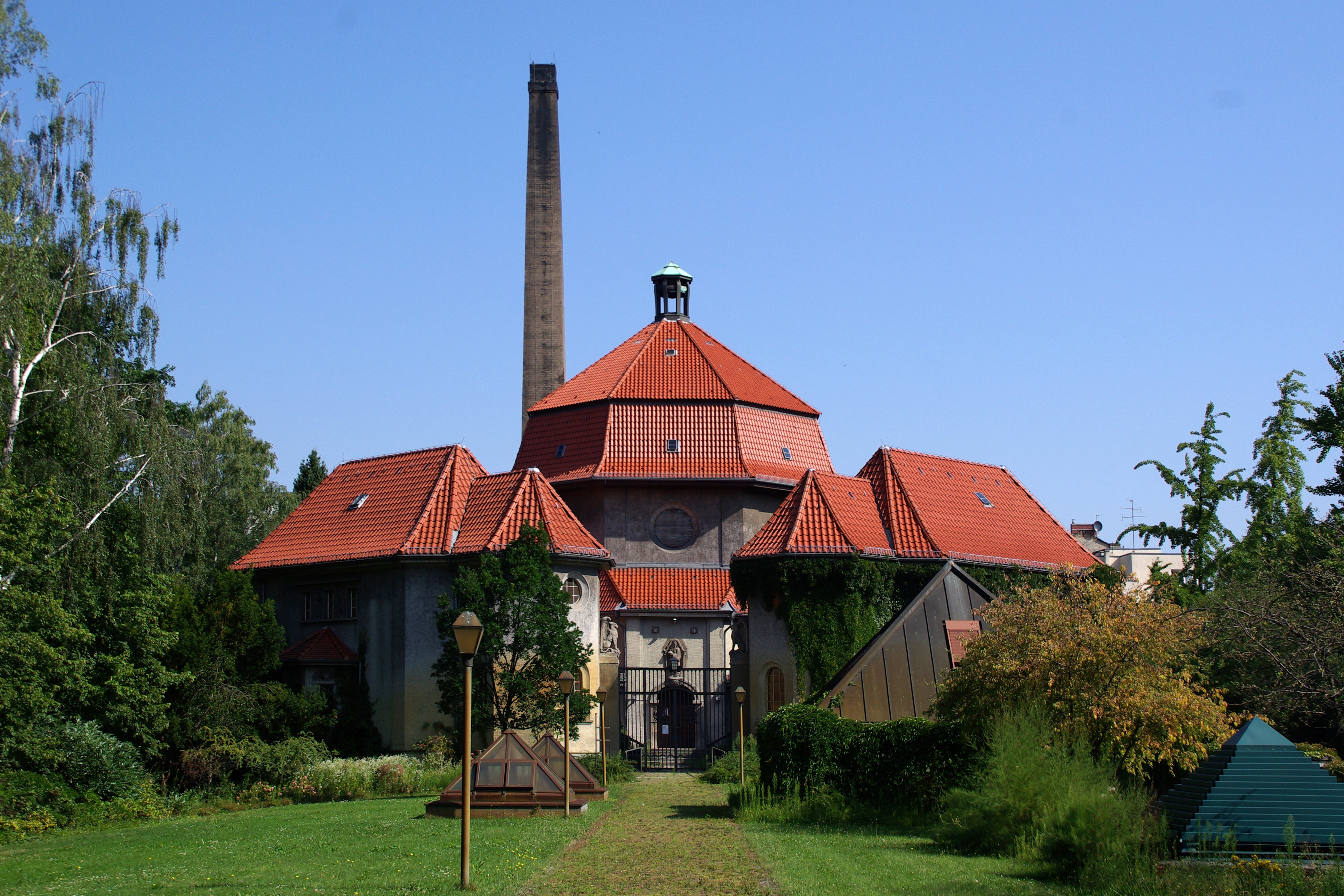 Berlin-Wedding. Der Urnenfriedhof in Berlin-Wedding steht unter Denkmalschutz. Das Krematorium.